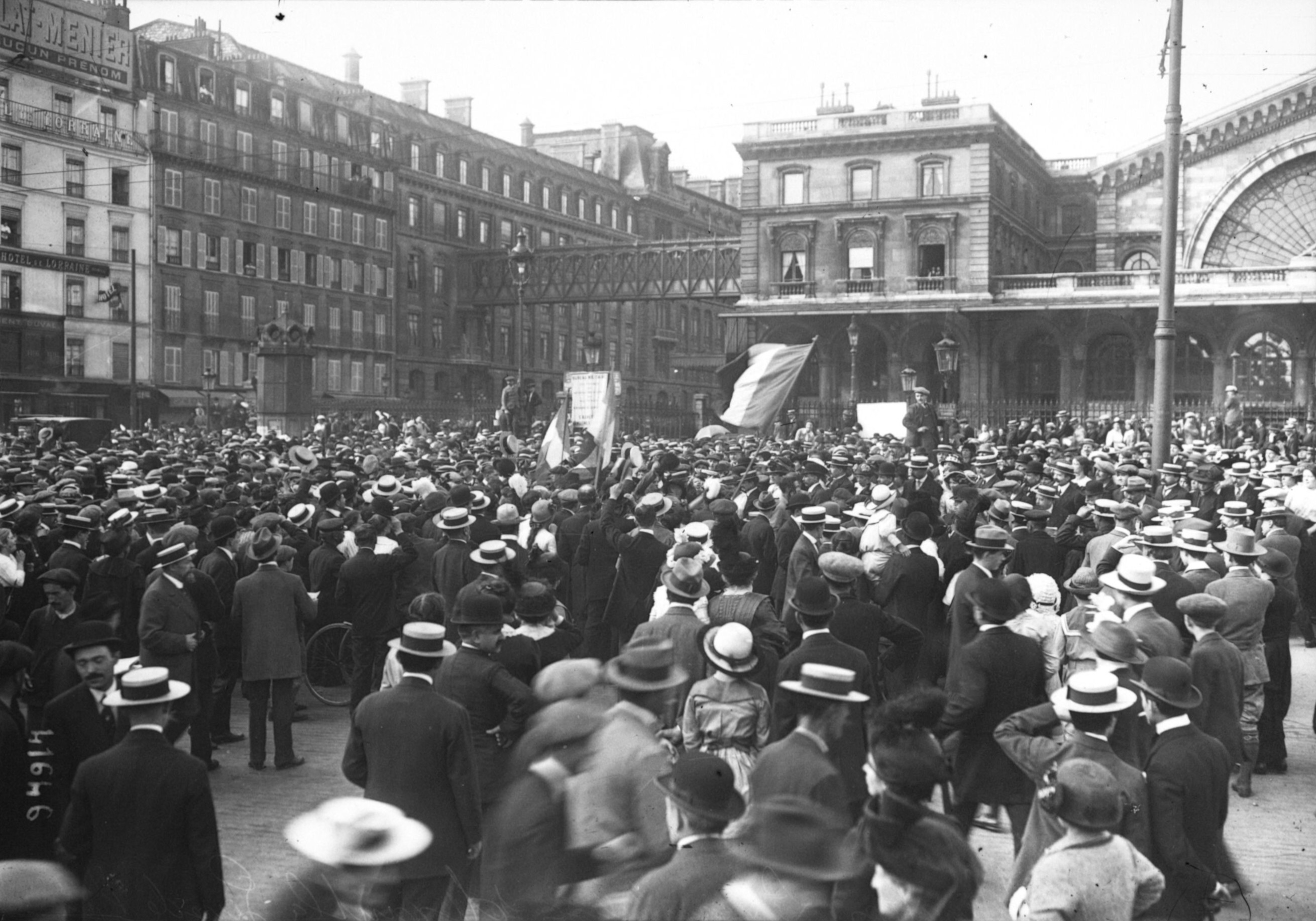 Mobilized people in front of the gare de l'Est, on august, 2 1914. The gateway between the station and the hotel on the left has been destroyed later, but the doors on each side are yet visible